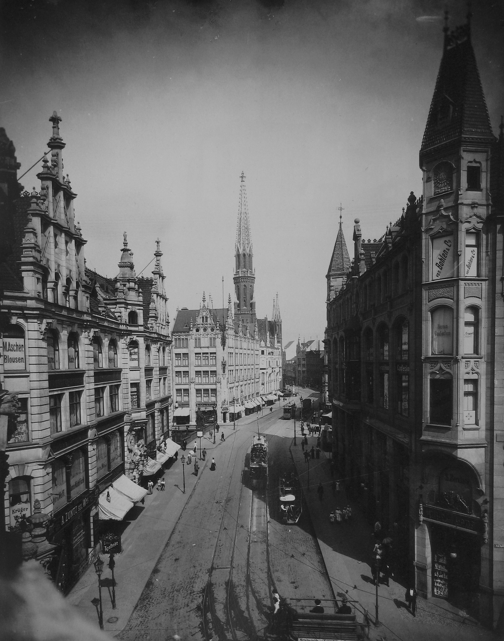 Berlin. Gertraudenstraße mit Gertraudenbrücke und Petrikirche, gesehen vom Spittelmarkt.